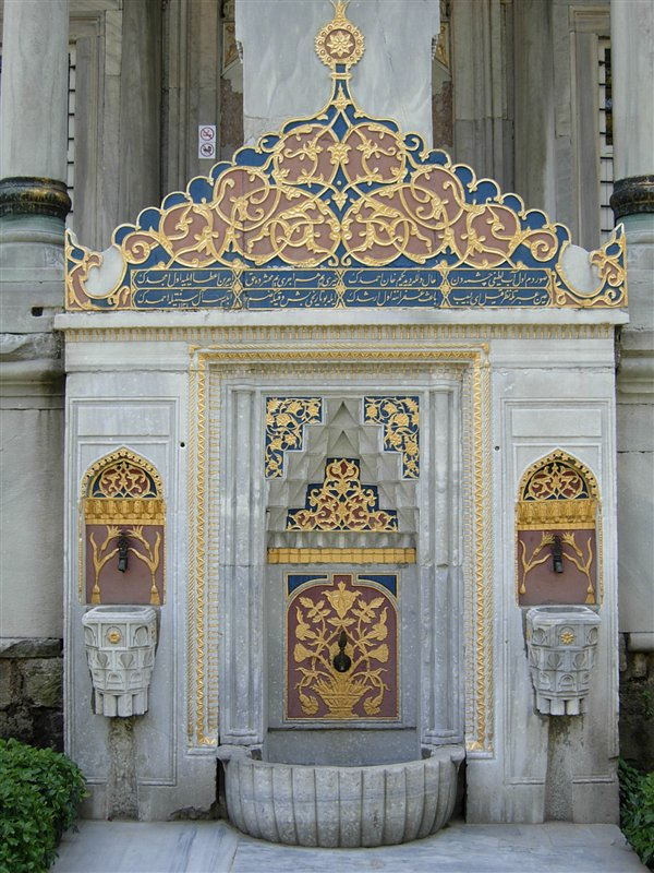 Istanbul Topkapi Palace